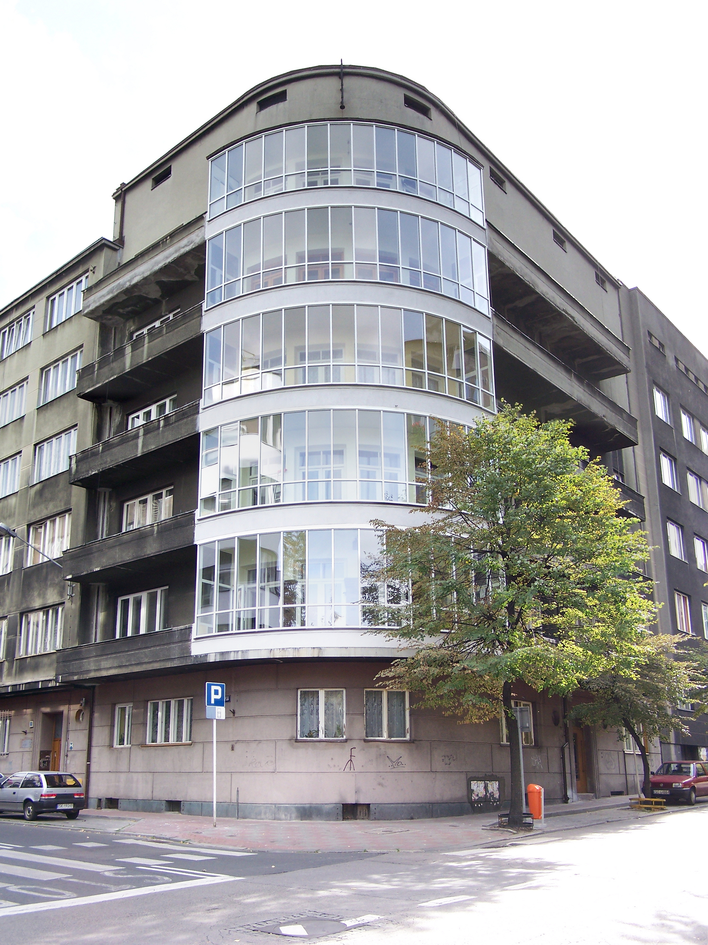 Modernistyczny budynek mieszkalny z lat 1920-30 z przeszkloną loggią (tzw. ogrodami zimowymi) przy ul. Marii Skłodowskiej-Curie 36 (róg z ul. PCK 7) w Katowicach.